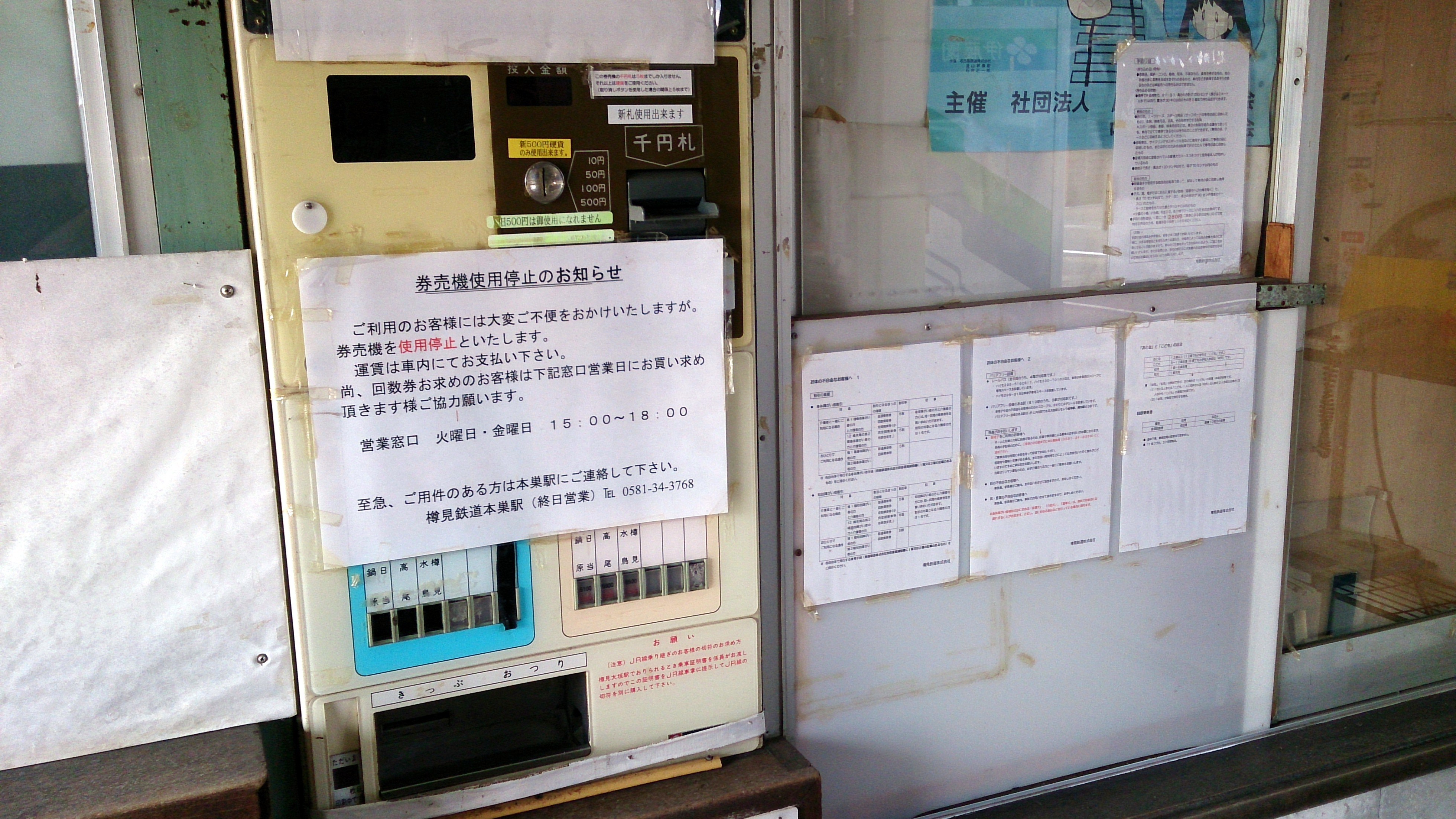 撮影時点でも故障中であり、使用中止となっていた。